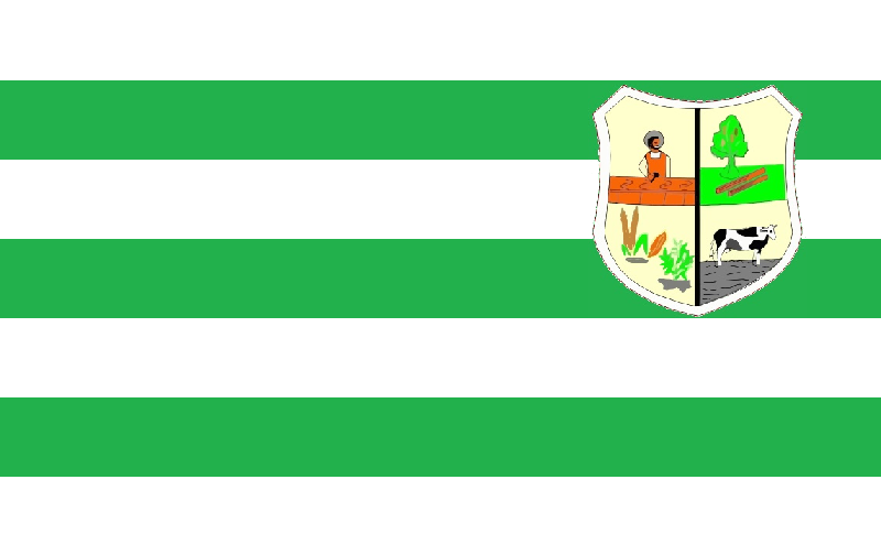 Bandera de Yguazú